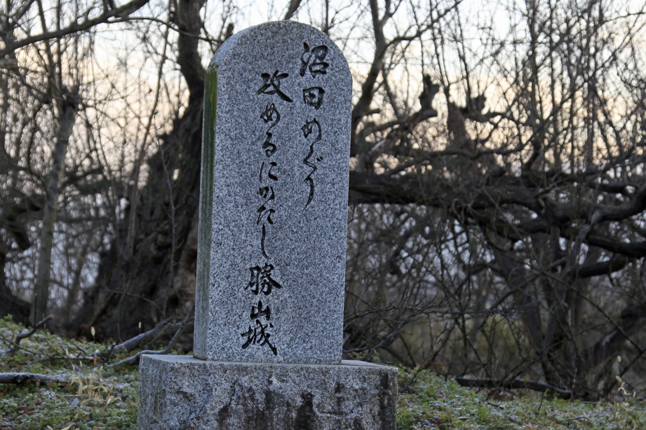 勝山城 (甲斐国八代郡)